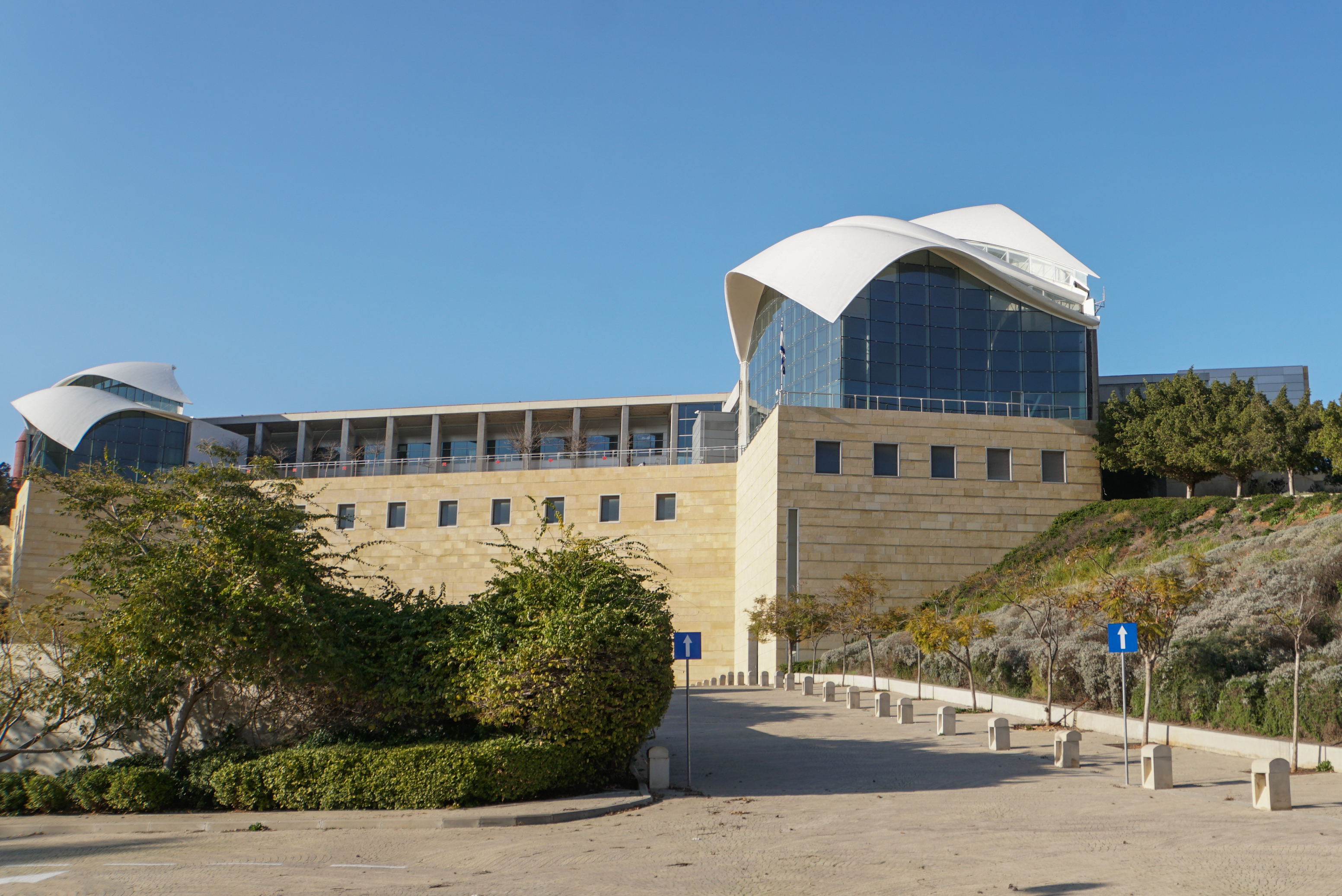 מרכז יצחק רבין, הוא מרכז בעל חשיבות לאומית, בנוסף לכך מדובר במבנה יפה במיוחד, התמונות האלה, מתייחסות לצורה הארכיטקטונית שלו